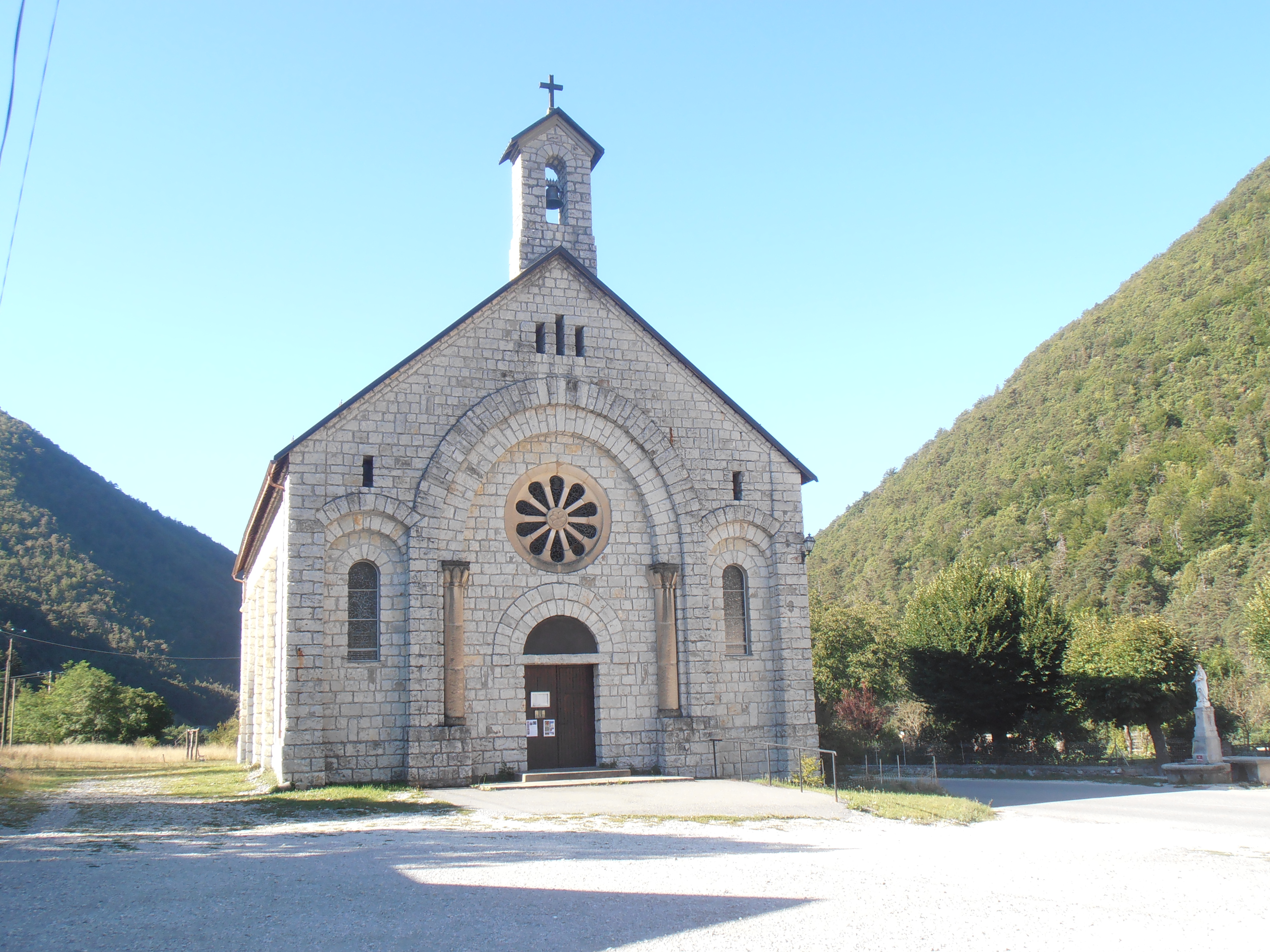 Alpes-de-Haute-Provence, Thorame-Haute-Gare, Chapelle Notre-Dame de la Fleur. La gare a donné son nom au lieu-dit : Thorame-Haute-Gare, mais localement on l'appelle aussi fréquemment "la Fleur" car c'est aussi le lieu d’implantation de cette chapelle miraculeuse aux origines médiévales. Le bâtiment actuel a été construit entre 1927 et 1947 (ou 1936-1947 selon les sources "archeo-provence") par l’abbé Juvénal Pélissier, curé de la paroisse de Thorame-Haute de 1925 à 1955 qui l'a reconstruite seul. Elle a été inaugurée par Monseigneur Cosme-Jorcin le 26 mai 1947 (Indications portées sur les vitraux de la chapelle). Ses vitraux représentent différentes essences de fleurs de la vallée ainsi que plusieurs églises et chapelles du Haut Verdon et de la Vaïre. Sa toiture a la particularité d'être recouverte de plaques de cuivre.